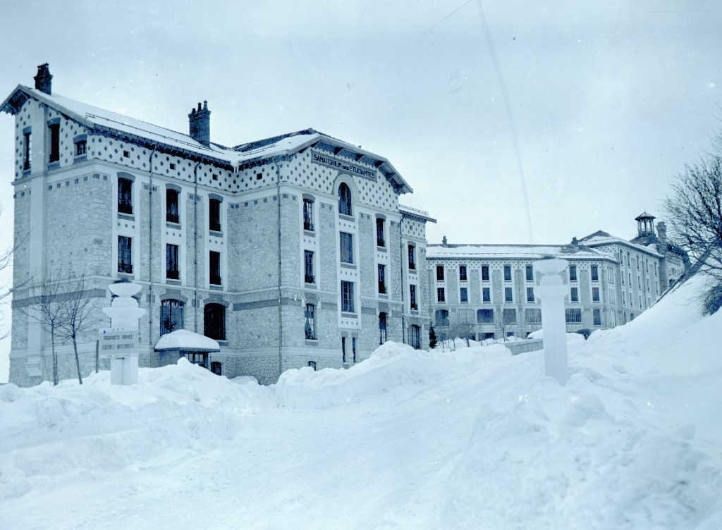 The Sanatorium des Etudiants de France, Saint Hilaire du Touvet, France. From the road. (Le Sanatorium des Etudiants de France, Saint Hilaire du Touvet, France. Depuis la route.) Scanned by Michel Gravier and Christine Plumejeaud with the permission of Mr Pauget, Chief Doctor at CMUDD Saint Hilaire du Touvet, from the CMUDD archive photos album.